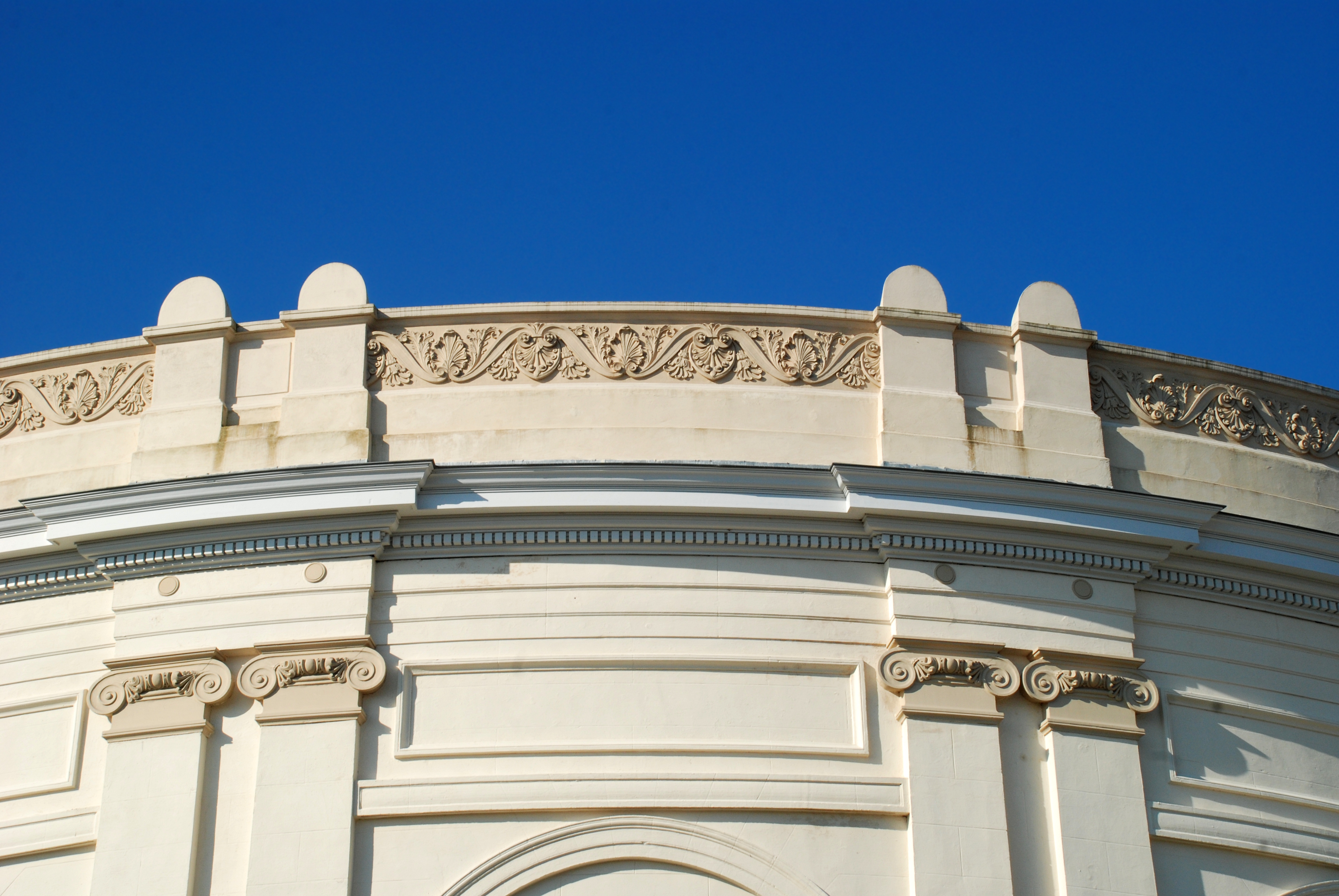 Belgique - Brabant wallon - Braine-l'Alleud - Panorama de la Bataille de Waterloo